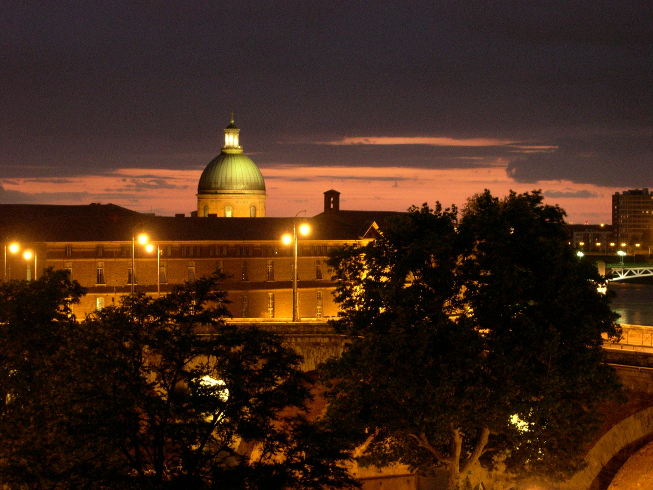 La Garonne à Toulouse vue du quai de Tounis au crépuscule